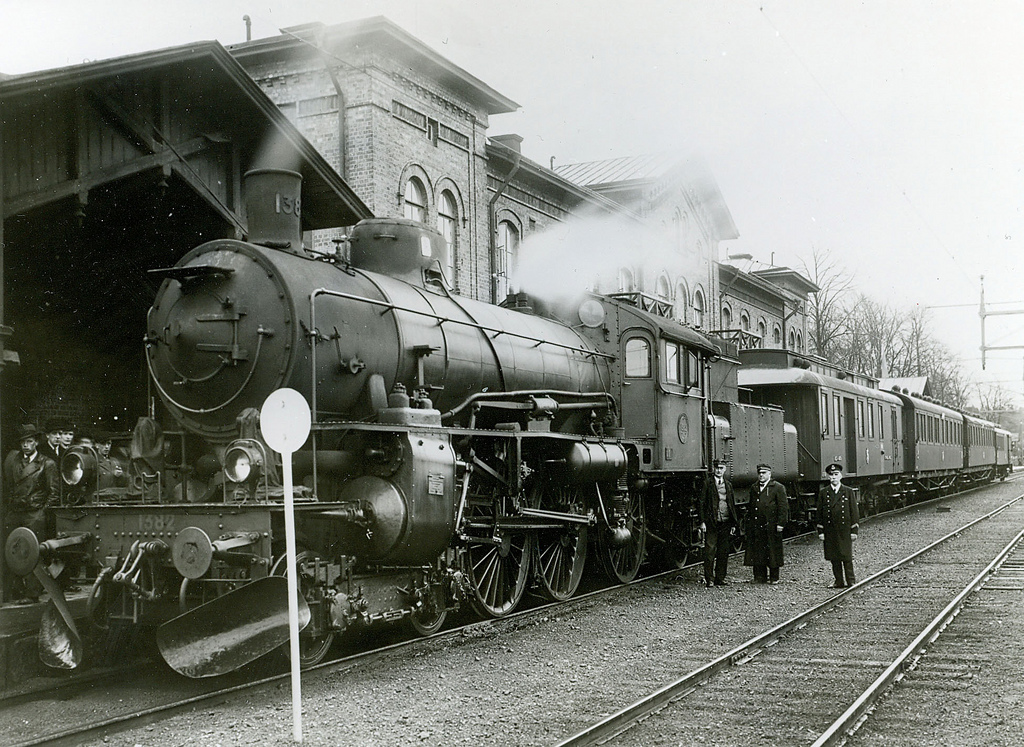 SJ B 1382 i Arvika på 1930-talet. Bild från Nybergska samlingen Sveriges Järnvägsmuseum, Gävle. Fotot taget 23 april 1937 när Pt 1414 skulle avgå från Arvika. Personerna vid loket är från höger stins LGW Nordström, lokförare G Wennerström och en eldare.